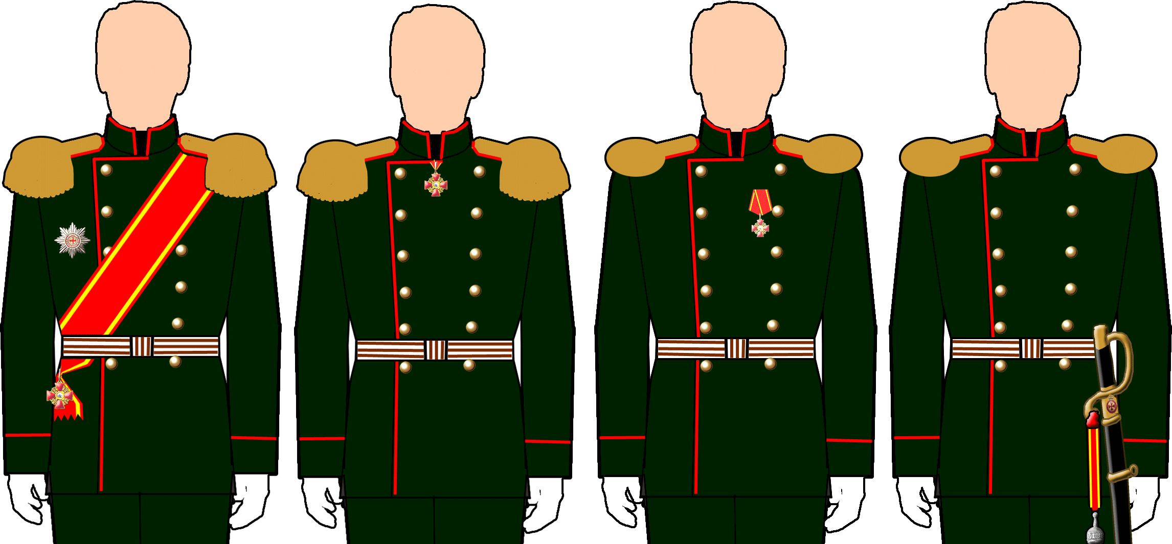 Российская империя Схема размещения орденских знаков Ордена Св. Анны